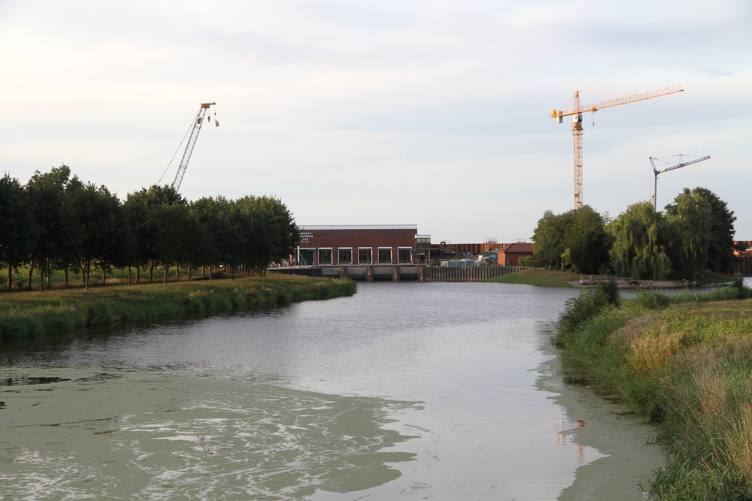 Blick auf das Schöpfwerk in der Bauernschaft Wapelersiel der Gemeinde Jade. Der sichtbare Fluss ist die Jade.